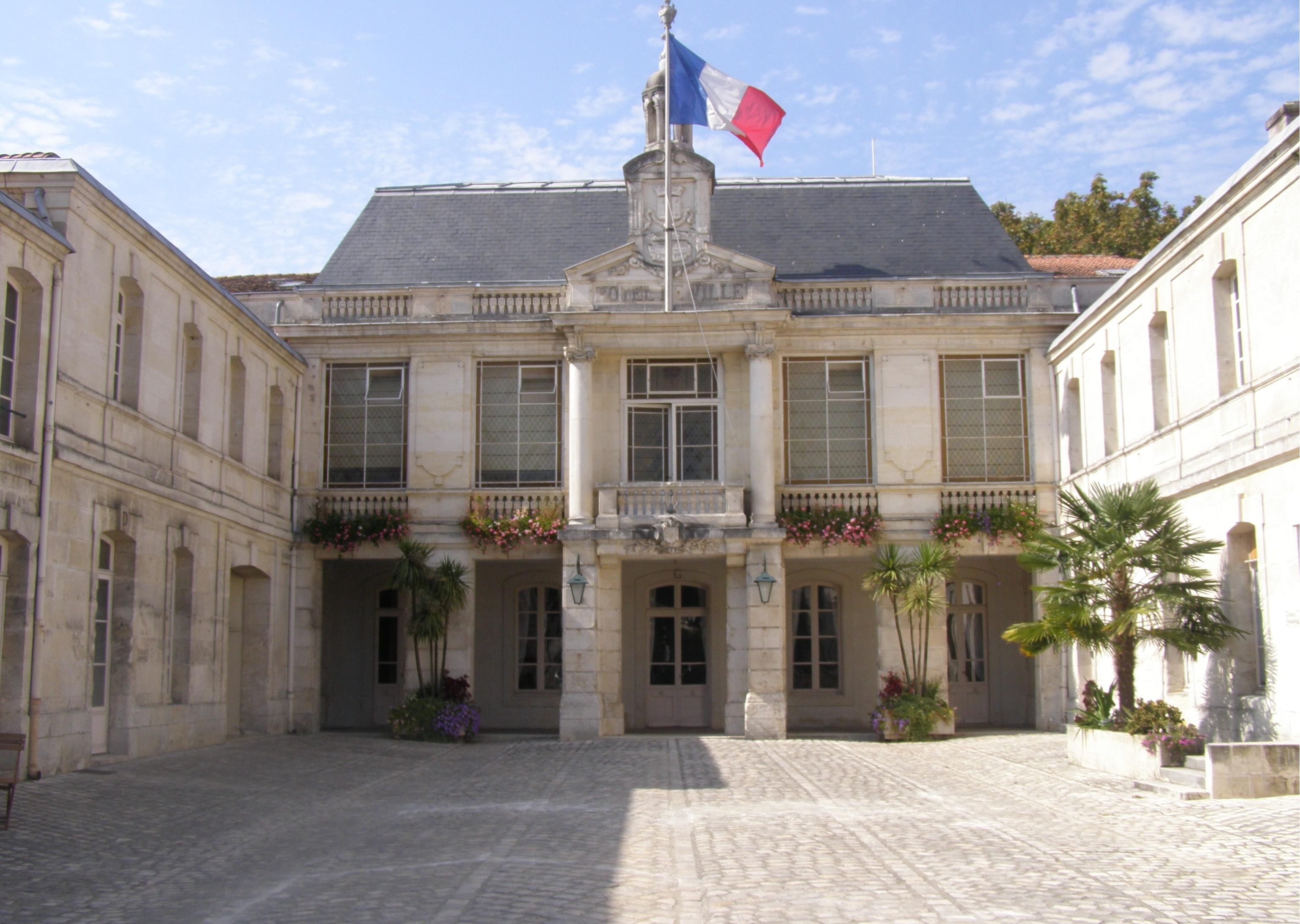 Hôtel de ville de Saintes